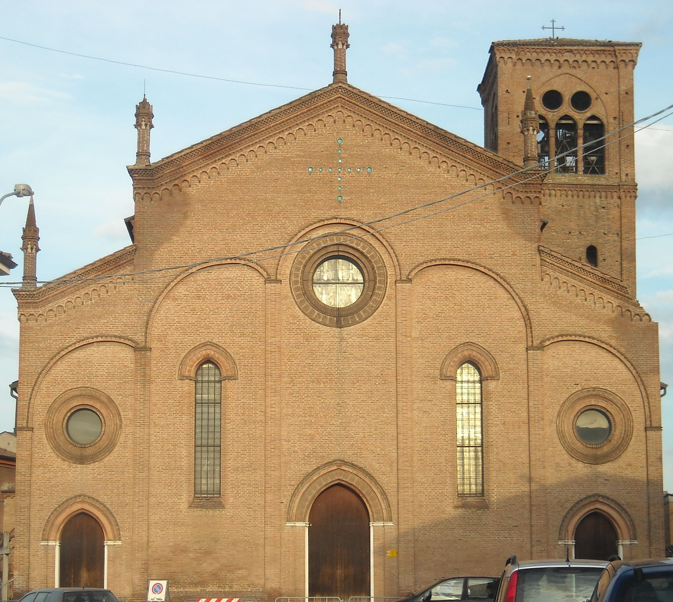 La chiesa arcipretale di Bondeno in provincia di Ferrara, costruita nel XII secolo.